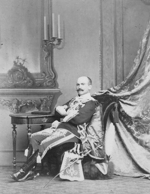 Граф Алексей Васильевич Олсуфьев (1831—1915)